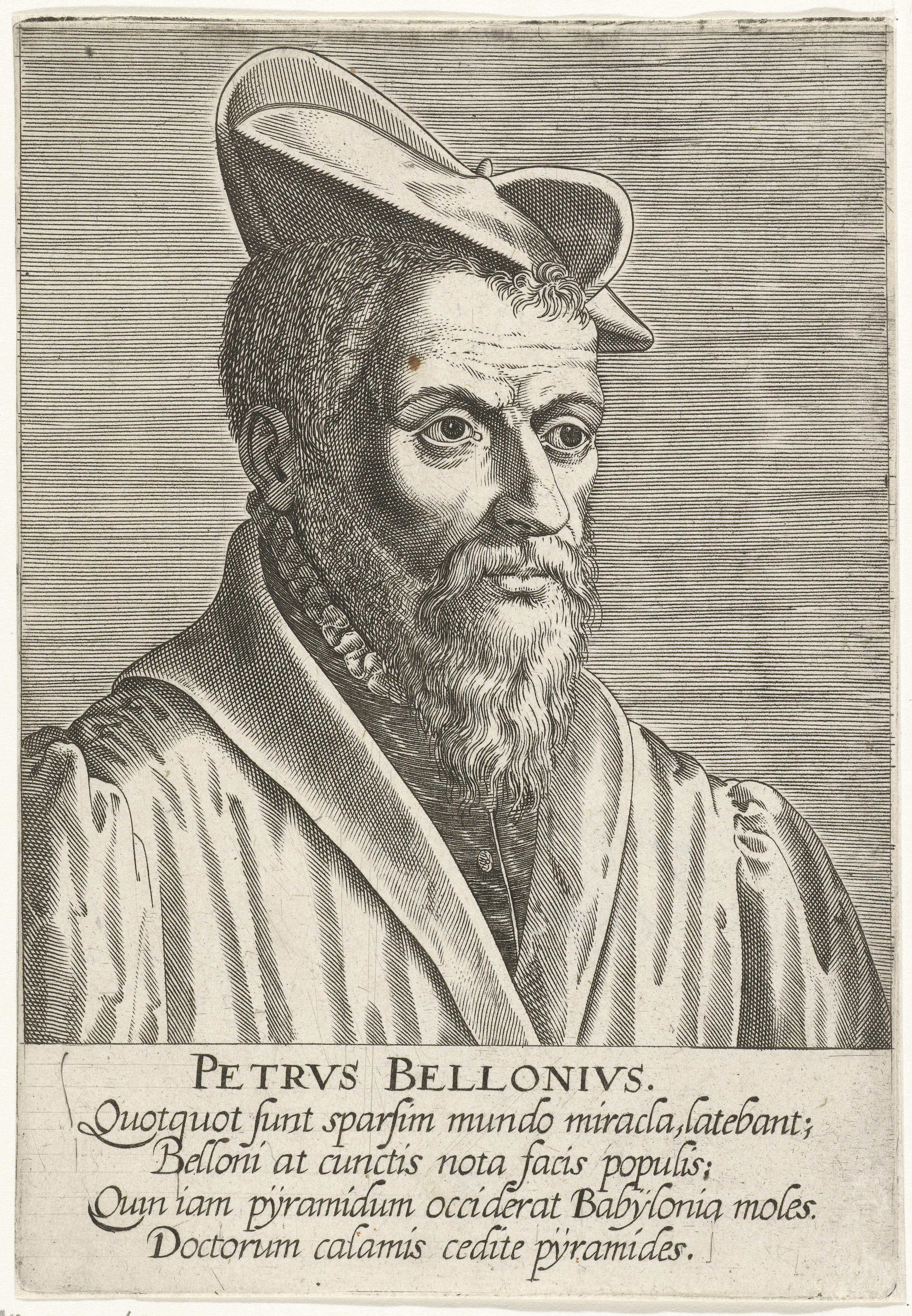 IdentificatieTitel(s): Portret van Pierre BelonPetrvs Bellonivs (titel op object)Portretten van beroemde geleerden (serietitel)Imagines L. Doctorum Virorum (serietitel)Objecttype: prent Serienummer: 41/51Objectnummer: RP-P-1909-1063Catalogusreferentie: New Hollstein Dutch 595Opschriften / Merken: verzamelaarsmerk, verso midden, gestempeld: Lugt 2228Omschrijving: Portret van Pierre Belon, een beroemde Franse natuurkundige . Buste naar rechts. De prent heeft een Latijns onderschrift en maakt deel uit van een serie van beroemde geleerden.VervaardigingVervaardiger: prentmaker: Philips Galleschrijver: Franciscus Raphelengius (I)uitgever: Philips Galle (mogelijk)uitgever: Theodoor Galle (mogelijk)Plaats vervaardiging: AntwerpenDatering: 1587 - 1606Fysieke kenmerken: gravureMateriaal: papier Techniek: graveren (drukprocedé)Afmetingen: plaatrand: h 168 mm × b 116 mmOnderwerpWie: Pierre BelonVerwerving en rechtenVerwerving: aankoop 1909Copyright: Publiek domein